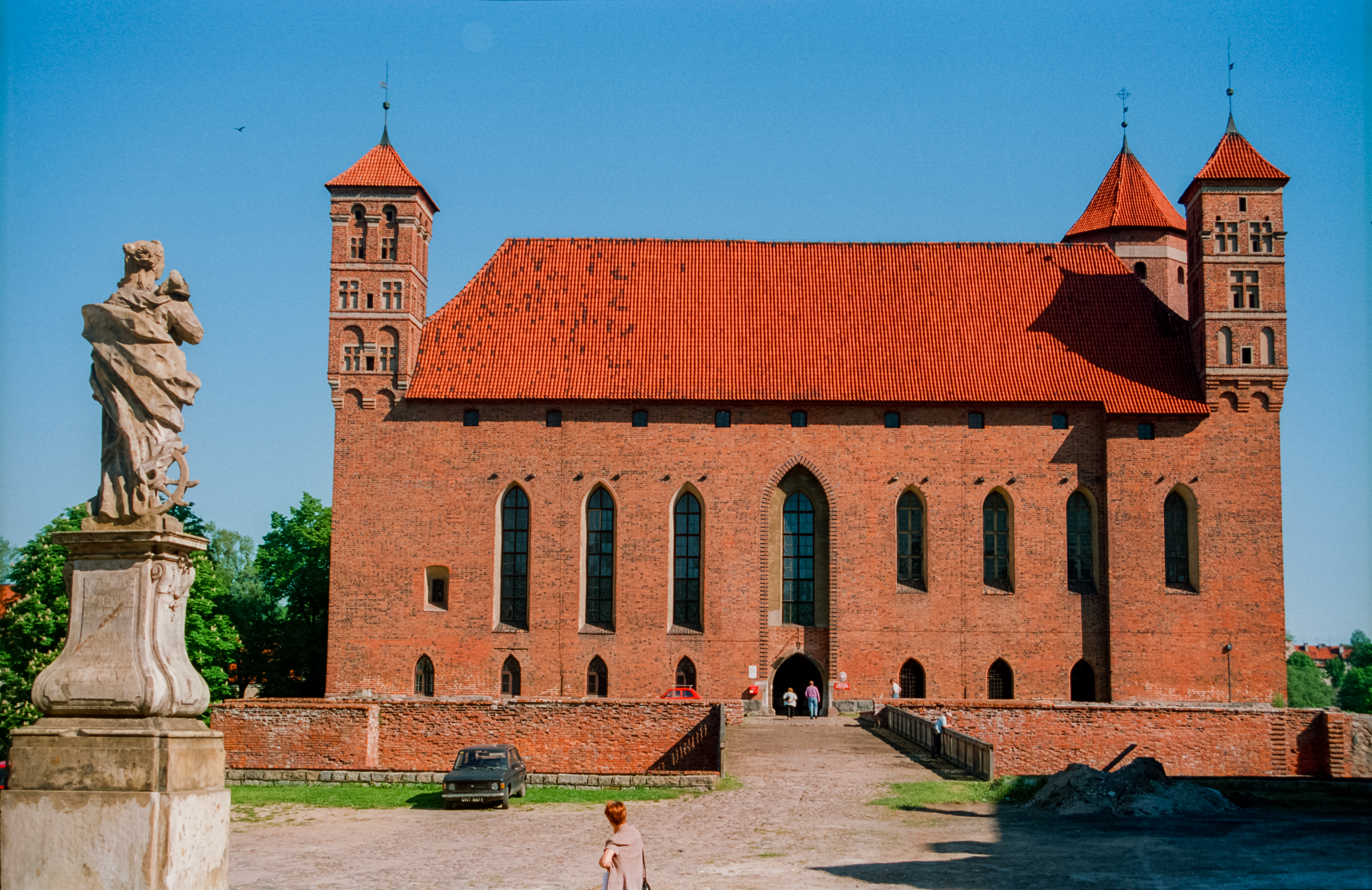 Poland, Lidzbark Castle